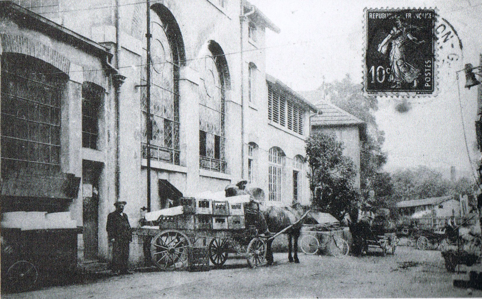 Brasserie de la Mouillère, à Besançon (Doubs, France).